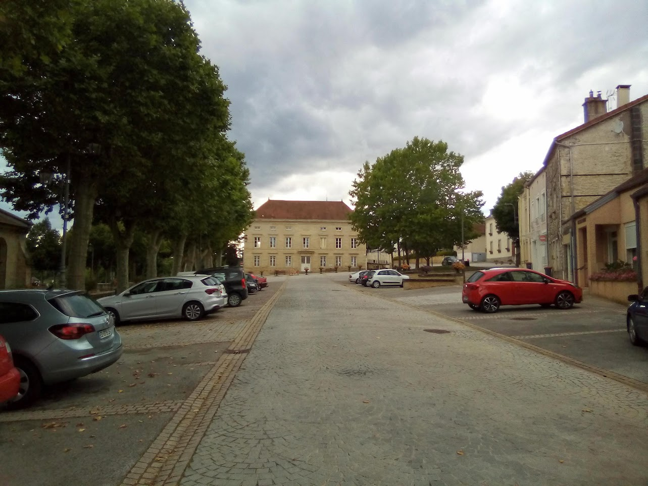 La place de Verdun à Bourbonne-les-Bains